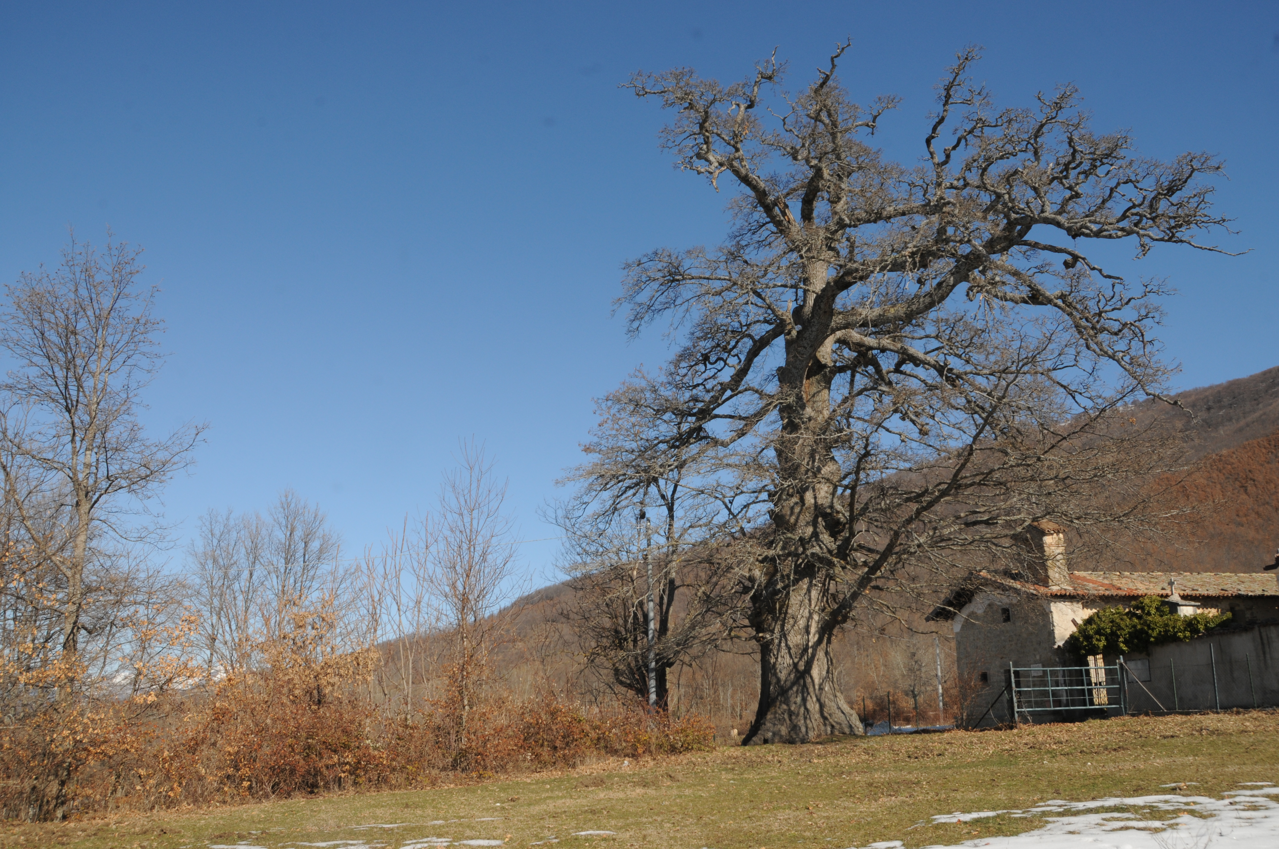 Il cerro situato a Sant'Angelo, frazione di Amatrice, sovrasta la deliziosa chiesina, è il più grande d'Italia